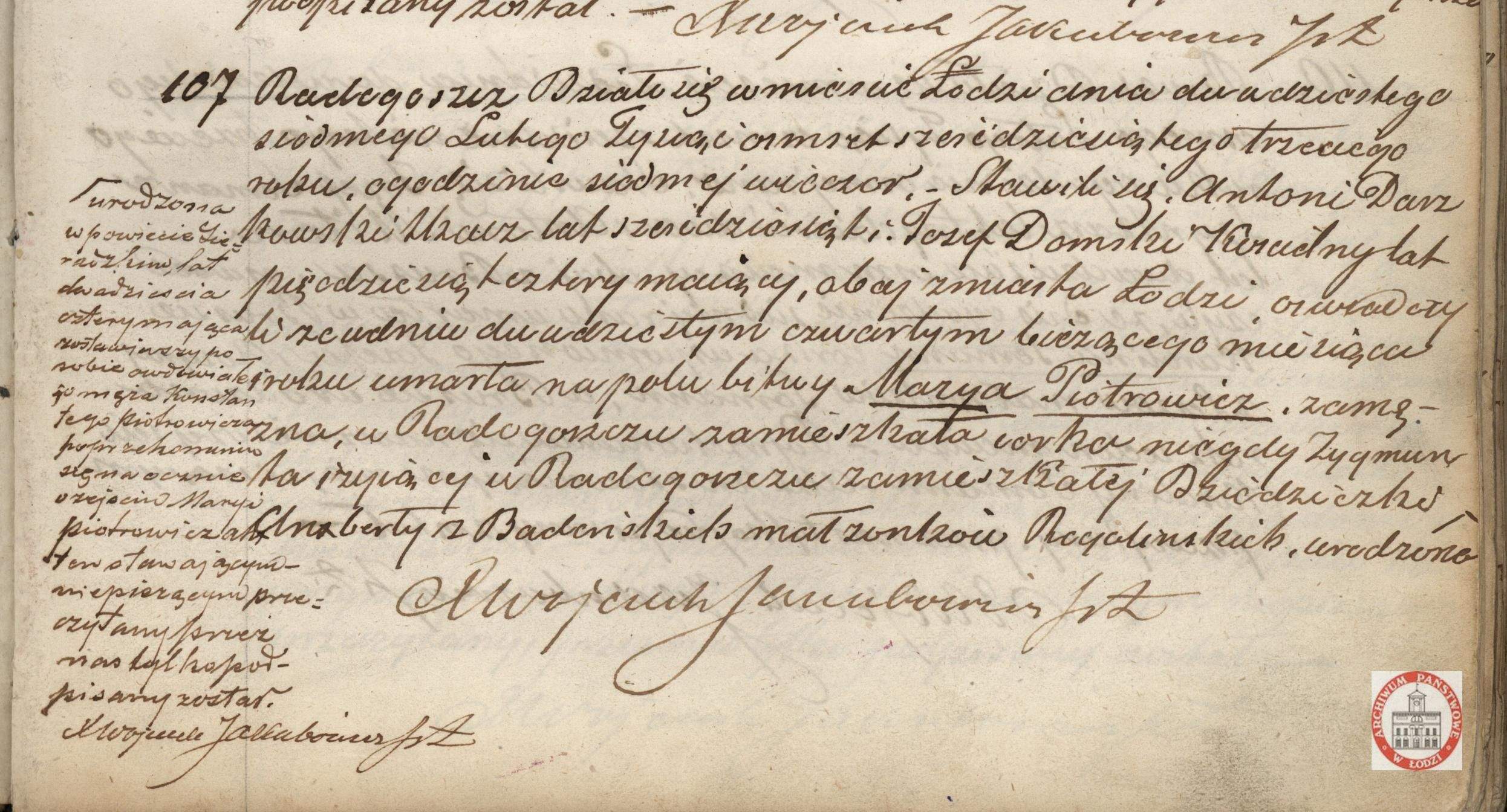 Akt zgonu Marii Piotrowiczowej z 24 lutego 1863 r., która poległa w bitwie pod Dobrą k. Łodzi